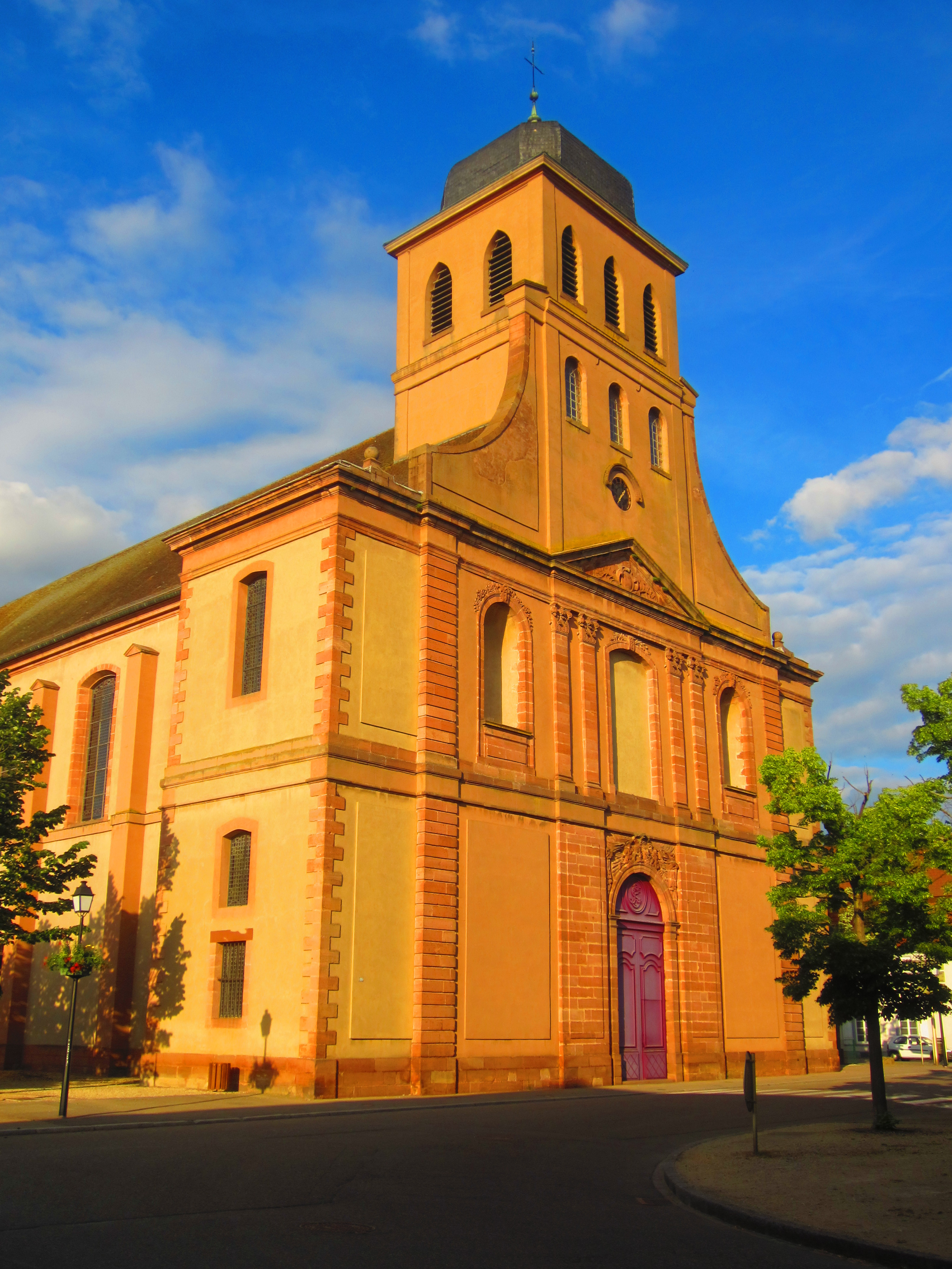 Eglise Neuf Brisach